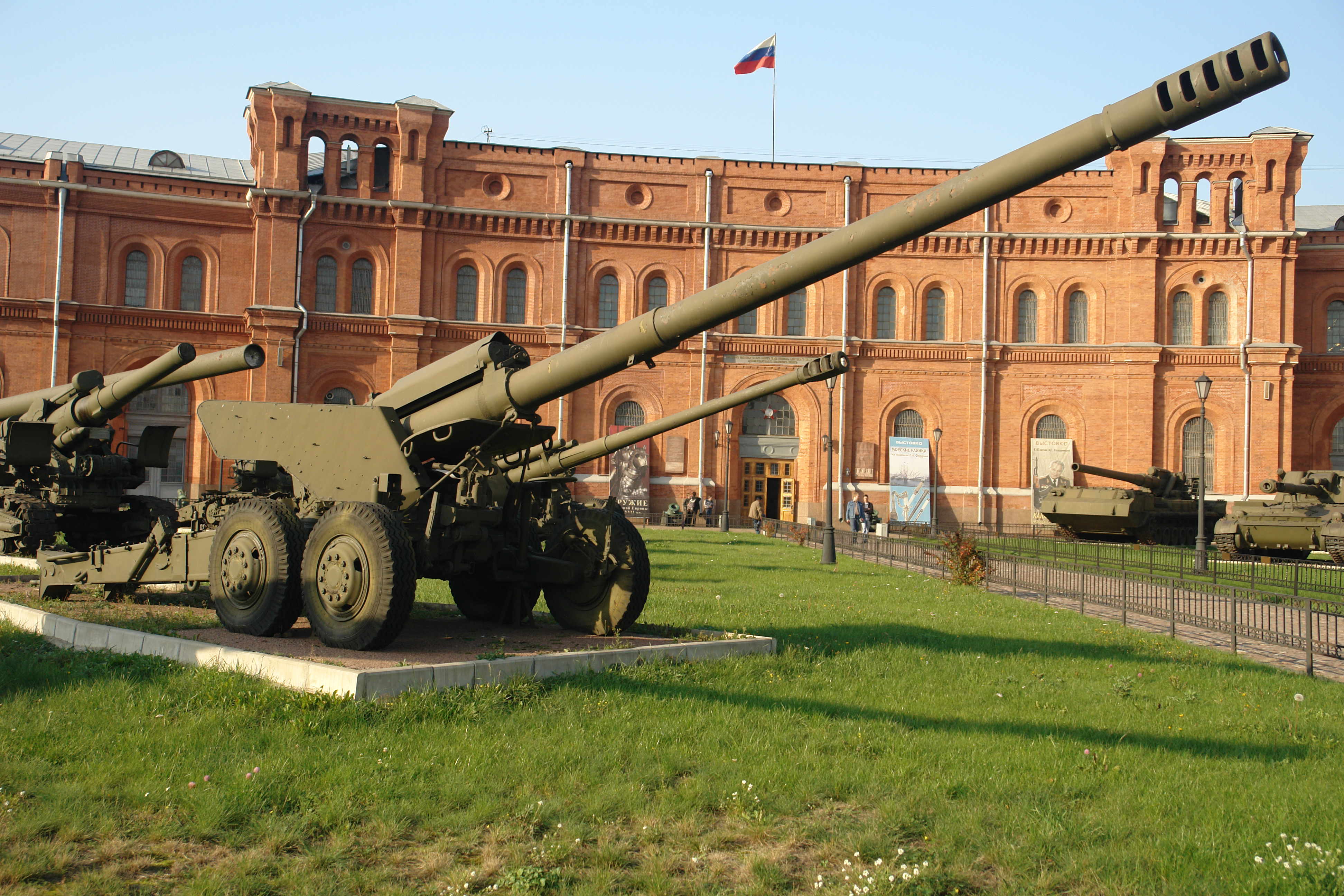 152-мм пушка 2А36 «Гиацинт-Б» (1979). Главный конструктор Ю.Н. Калачников. Дальность стрельбы, м - 27500, активно-реактивным снарядом - 32820. Скорострельность - 5-6 выстр/мин. Масса, кг: орудия - 9760, снаряда - 46. Расчет - 8 человек. Военно-исторический музей артиллерии, инженерных войск и войск связи, Санкт-Петербург.